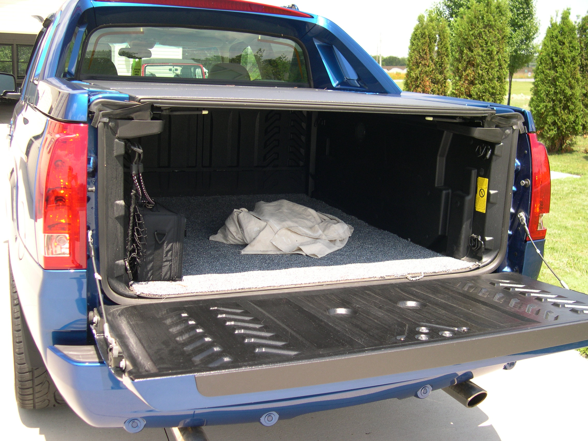 2003 Cadillac Escalade EXT